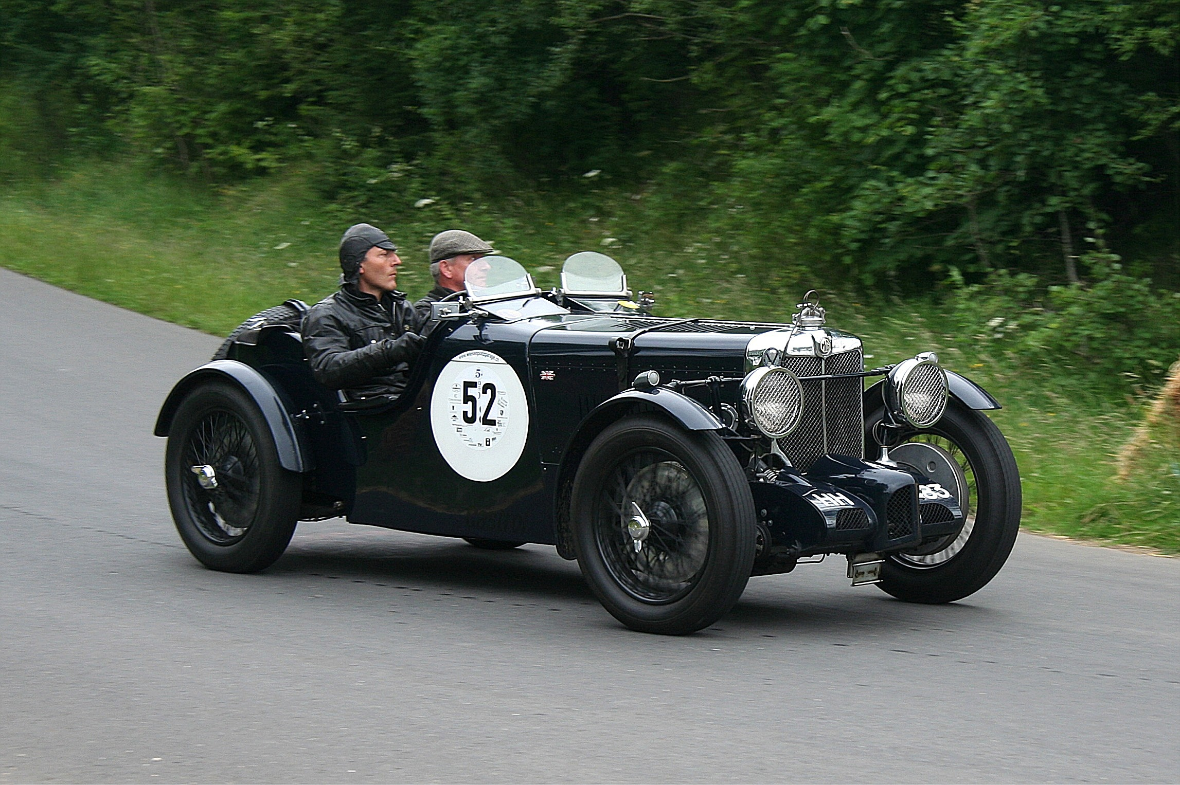 MG K-Type, Baujahr 1935, 1271 cm³, beim Oldtimer Festival des DAMC in einem erhaltenen Abschnitt der Nürburgringsüdschleife